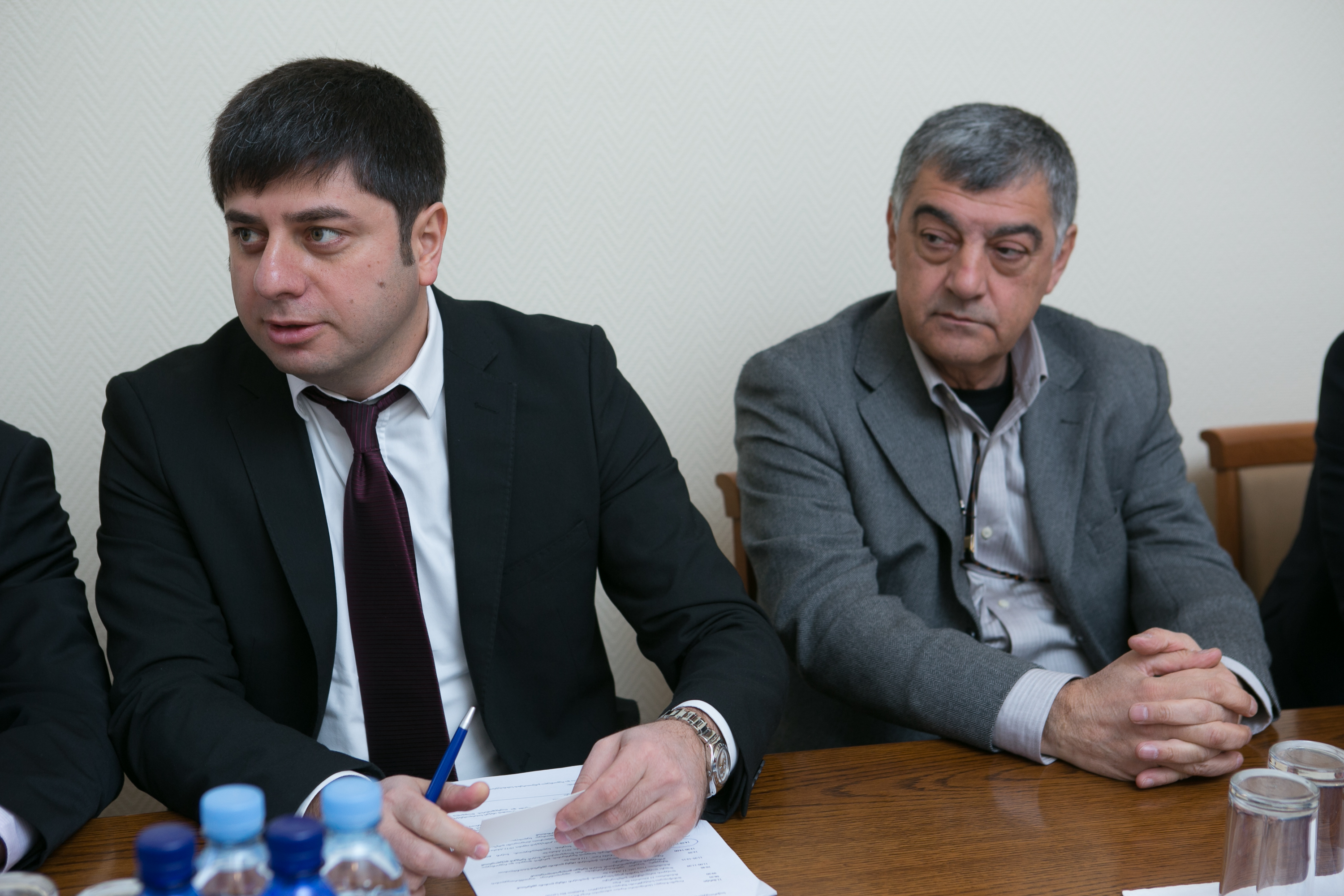 2013.gada 12.marts. Saeimas Budžeta un finanšu (nodokļu) komisijas priekšsēdētājs Jānis Reirs un Saeimas deputātu grupas sadarbībai ar Gruzijas parlamentu vadītājs Dzintars Zaķis tiekas ar Gruzijas parlamenta vicespīkeru Zurabu Abašidzi (Zurab Abashidze). Foto: Ernests Dinka, Saeimas Kanceleja